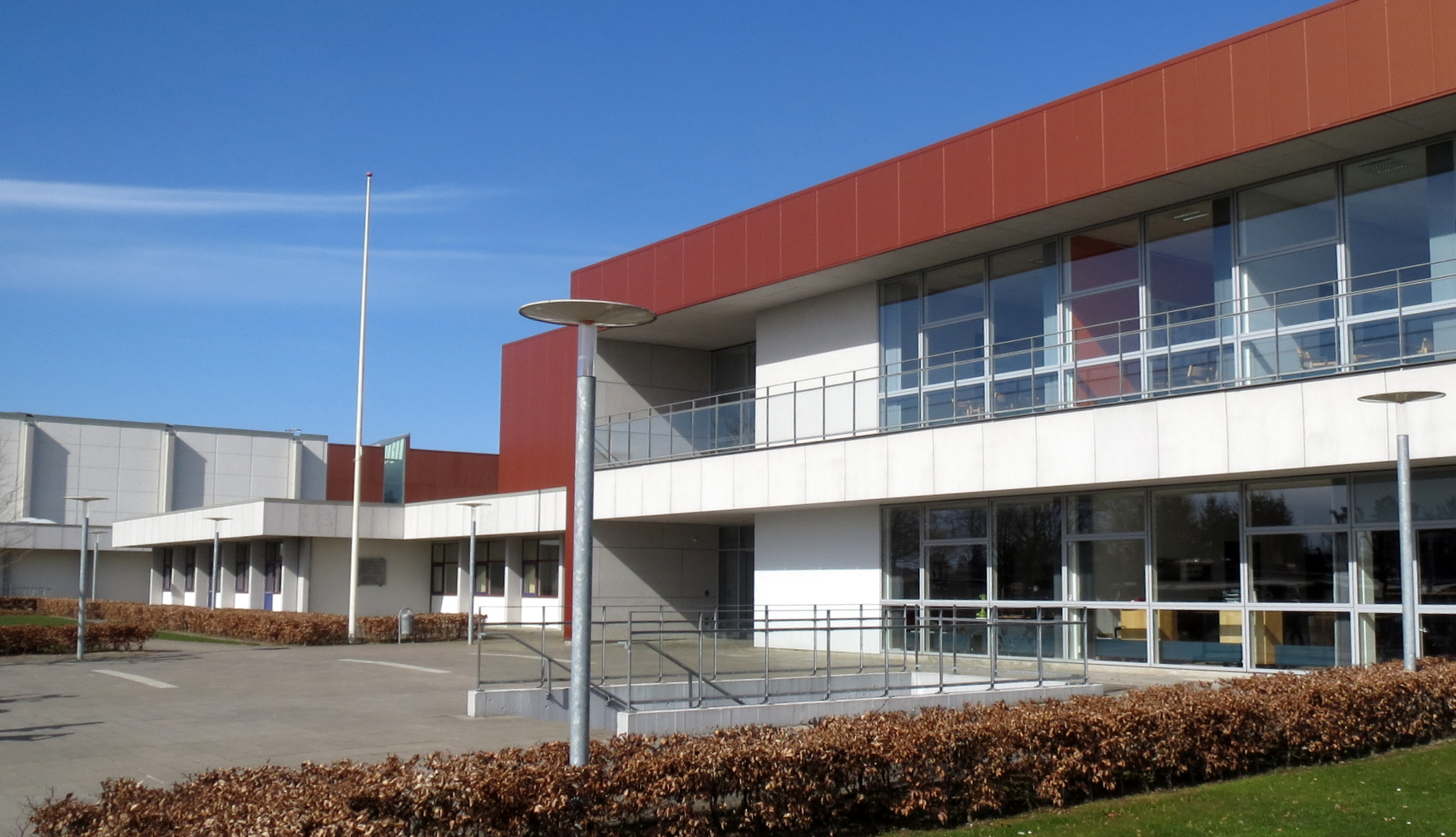 Indgangsparti